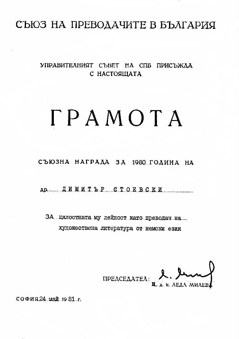 Грамота от СПБ за цялостна дейност като преводач на художествена литература от немски език